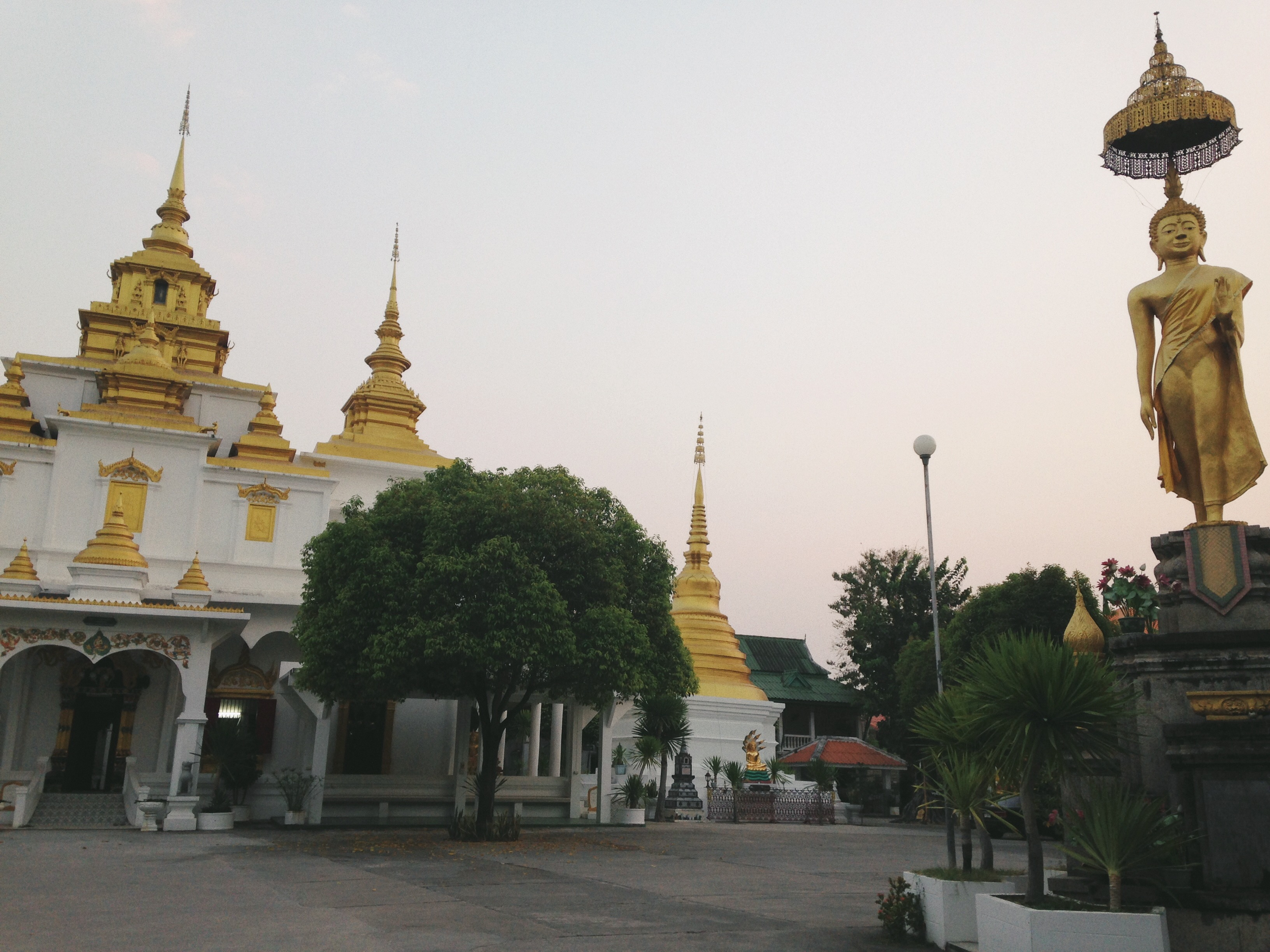 พระยืนด้านหน้าวัดเชตวันลำปาง